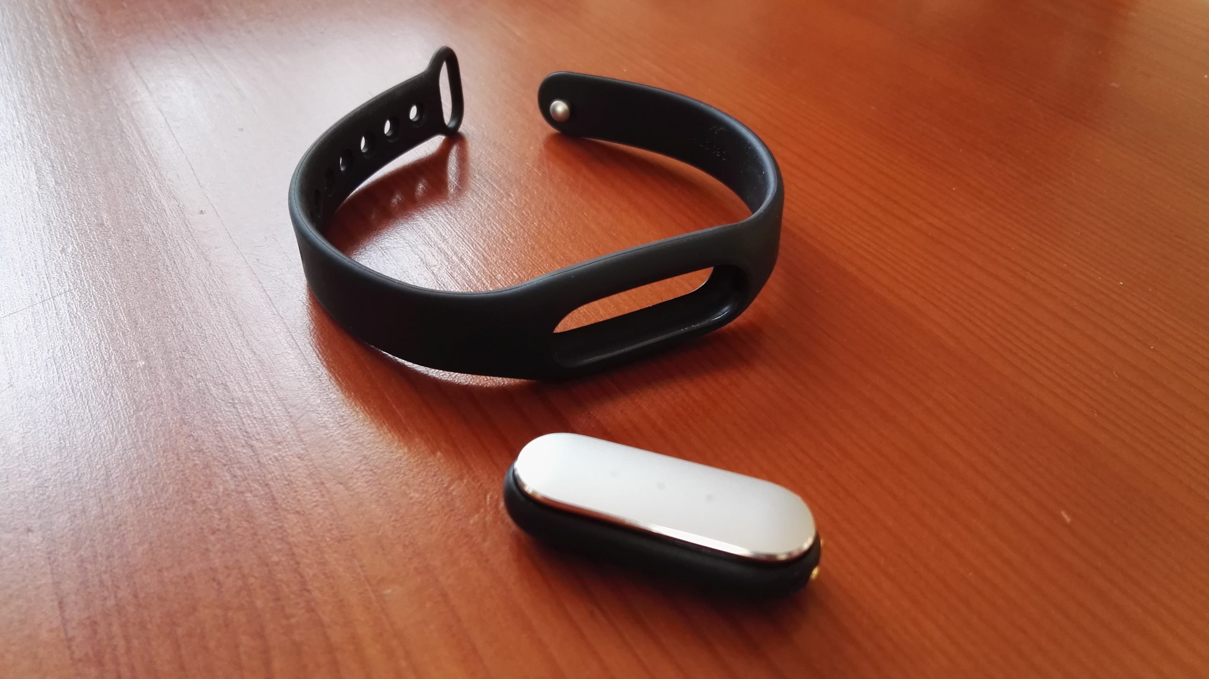 Urządzenie Xiaomi Mi Band w wersji 1s wyjęte z sylikonowej opaski.